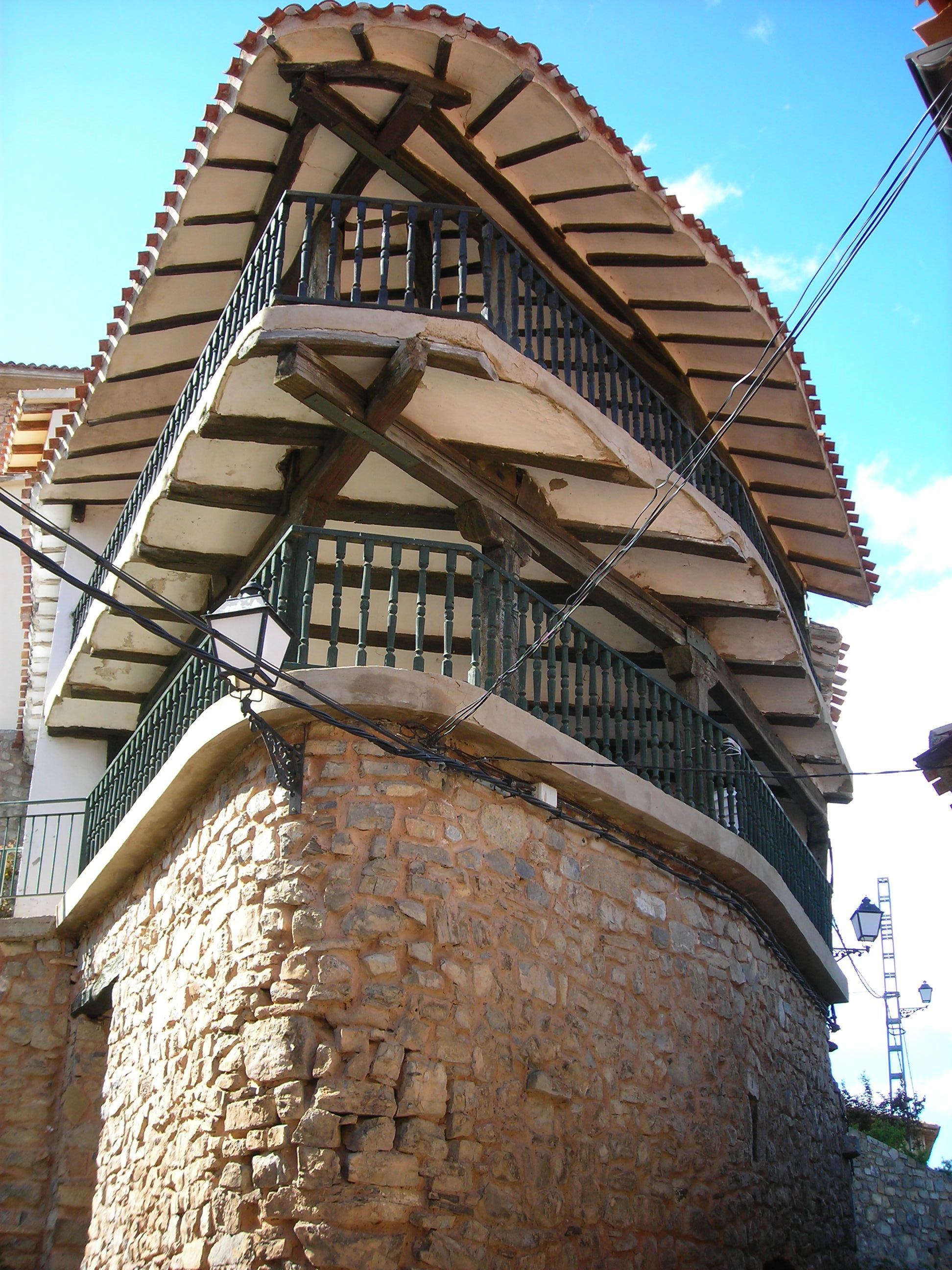 La Casa Barco desde la Calle de la Cuesta en Trevijano (La Rioja).